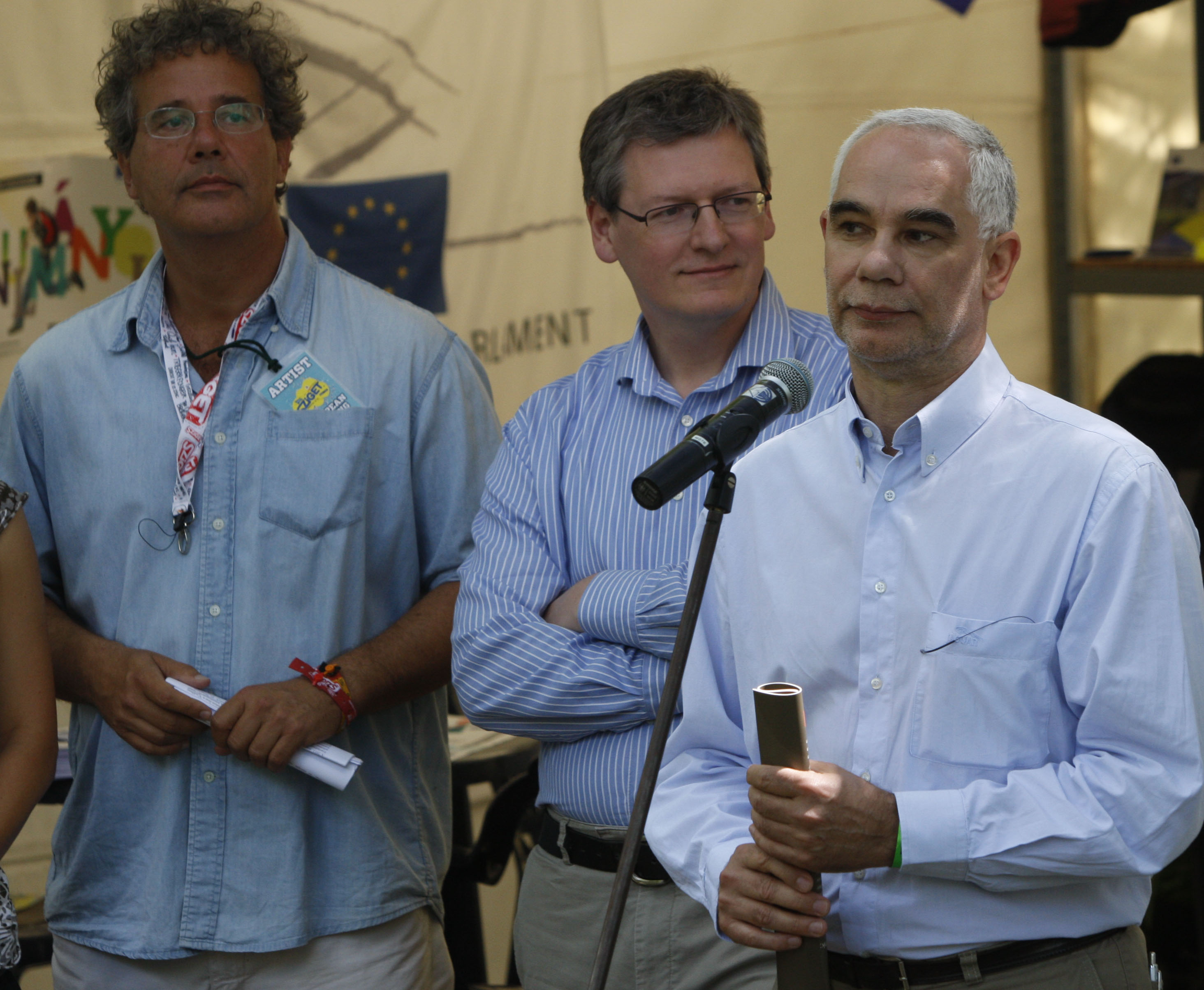 Budapest, 2011.08.10. Sziget fesztivál. Balog Zoltán, a Közigazgatási és Igazságügyi Minisztérium államtitkára beszél, mögötte (B1) Szűcs Tamás, az Európai Bizottság magyarországi képviseletének vezetője és (B2) Andor László az Európai Bizottság szociális ügyi és foglalkoztatáspolitikai biztosa.